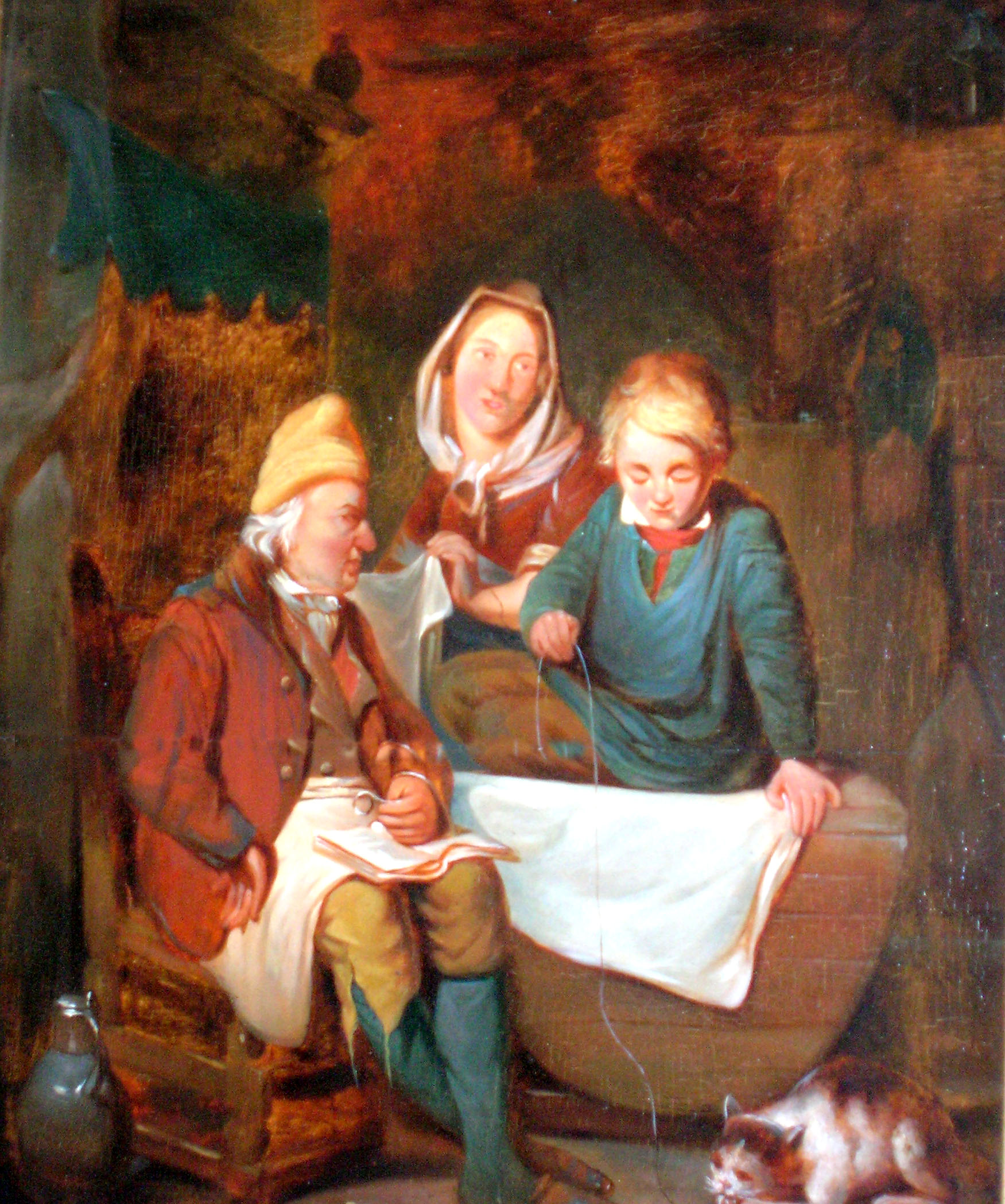 Ferdinand de Braekeleer (de Jongen) * 1828, † 1857: Familienszeen. Bild am Eegebesëtz